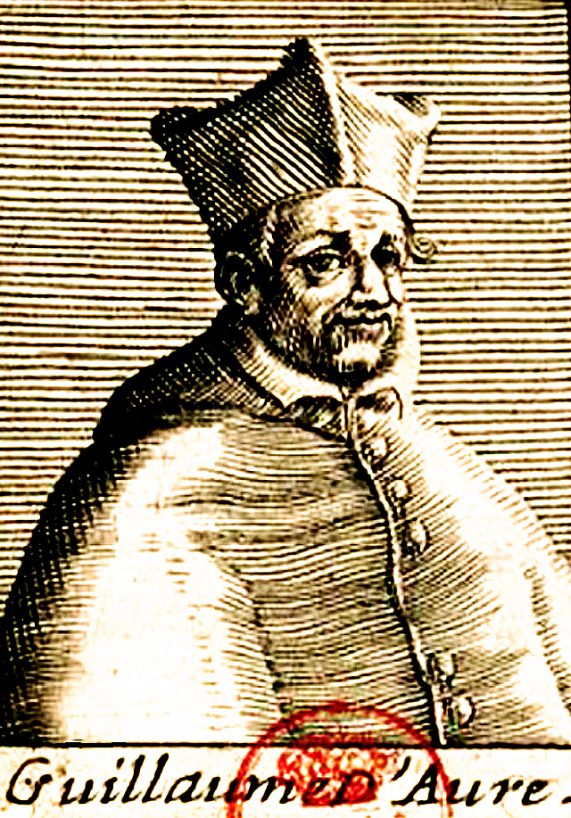 Cardinal Guillaume d'Aure